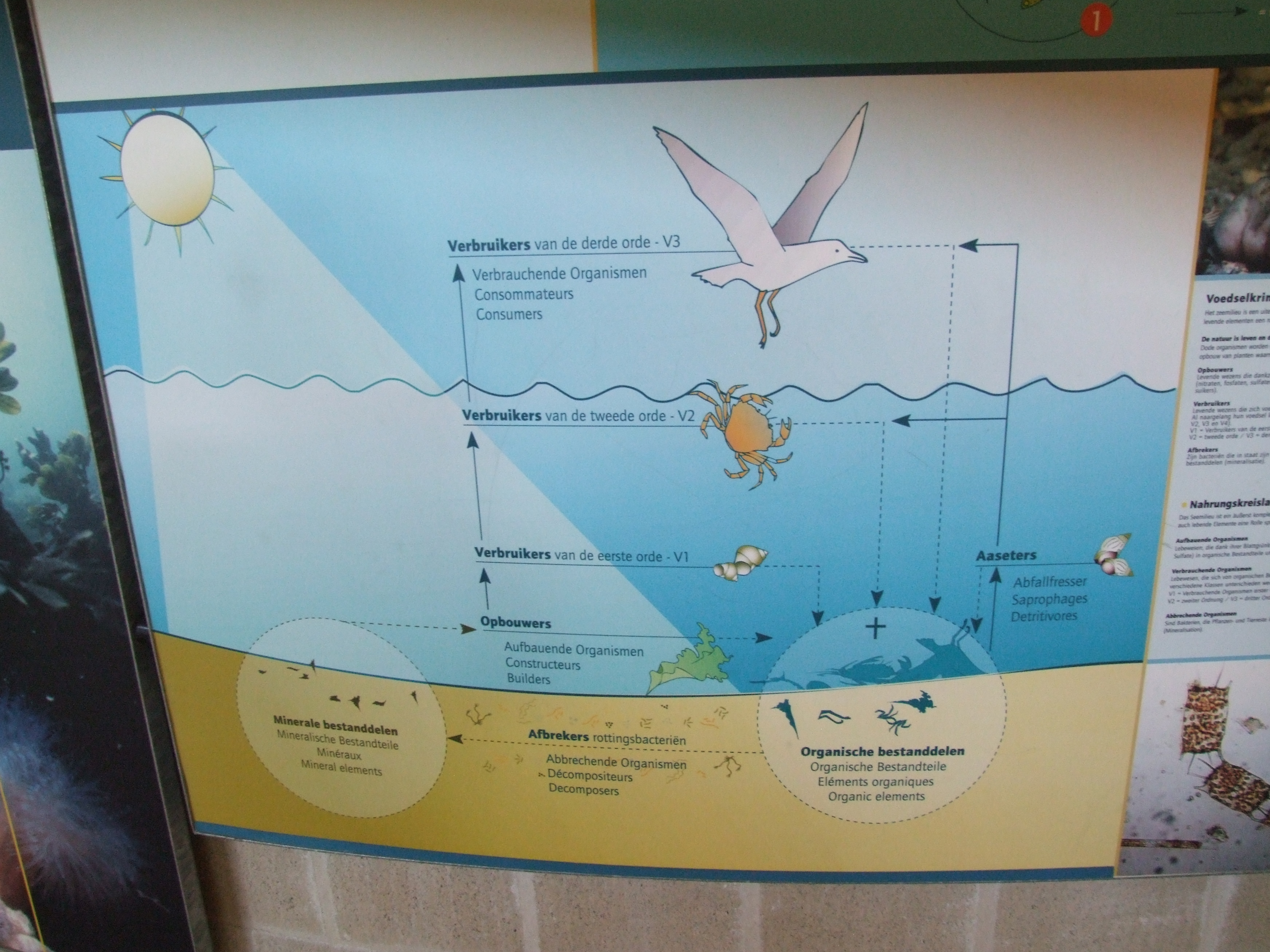 Schautafel im Besucherzentrum De Nachtegaal, De Panne, Belgien